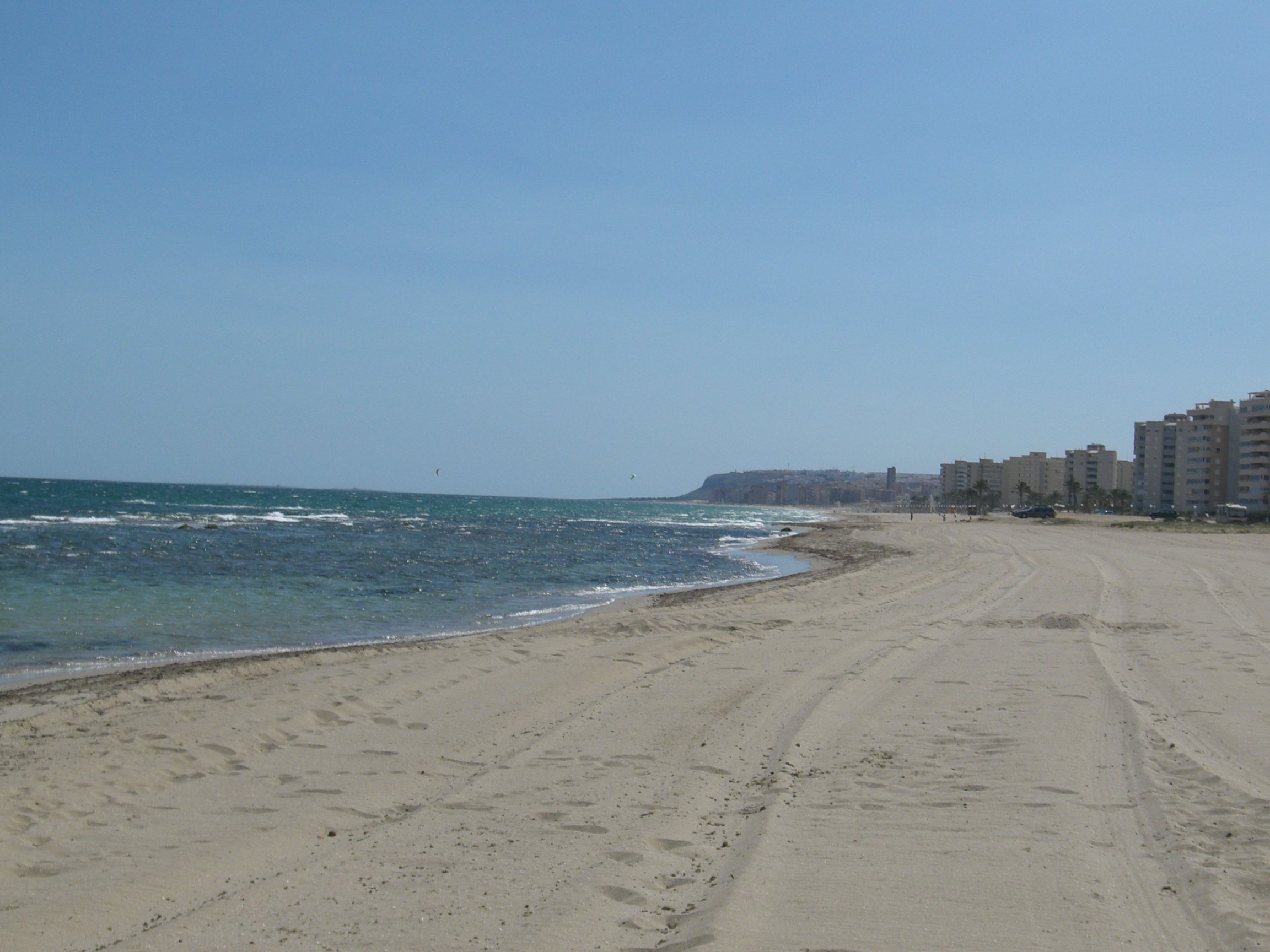 Platja dels Saladars, Alacant. Situada a la urbanització d'Urbanova.